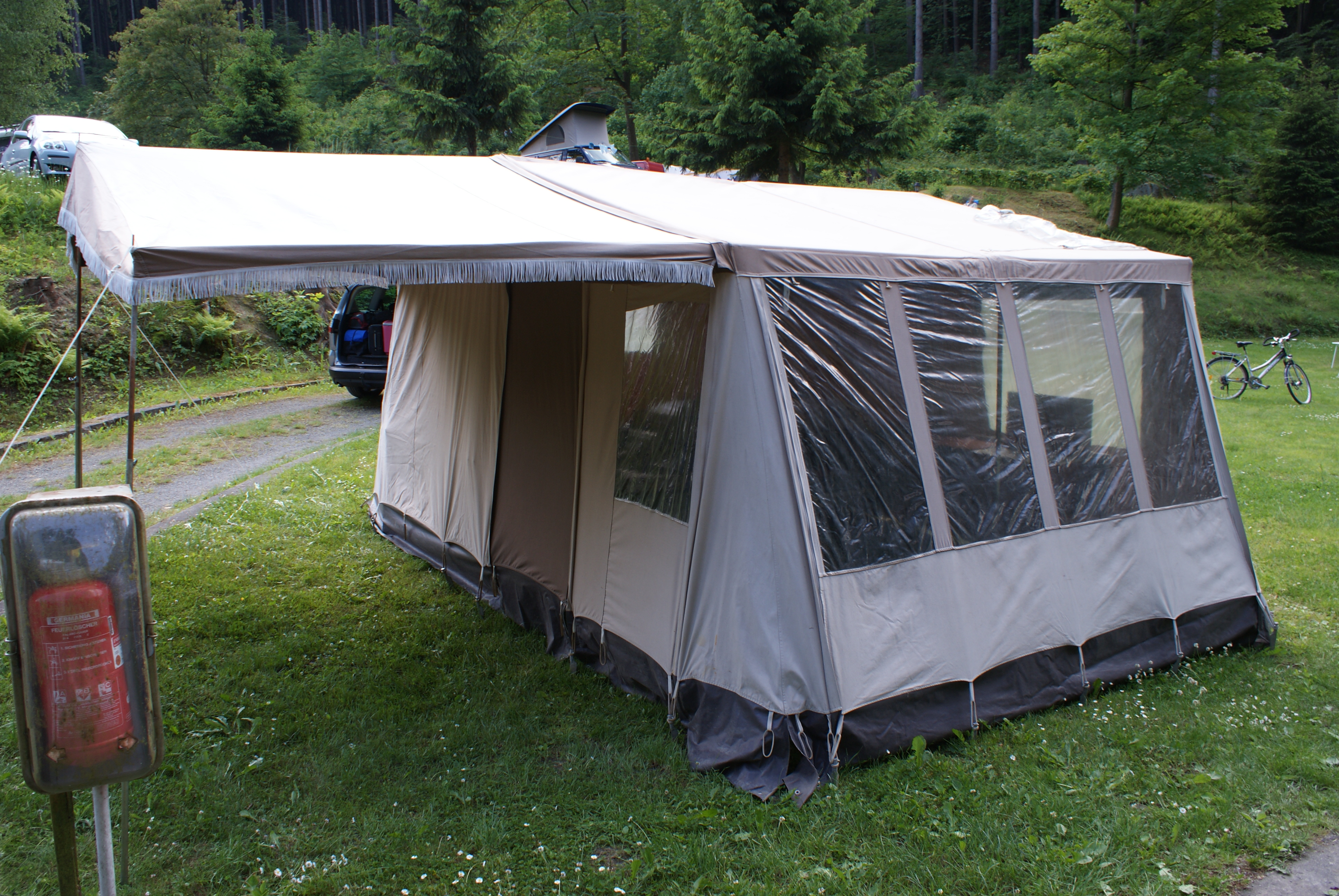 Camptourist CT5 ohne Vorzelt (Klappfix, Alpenkreuzer)